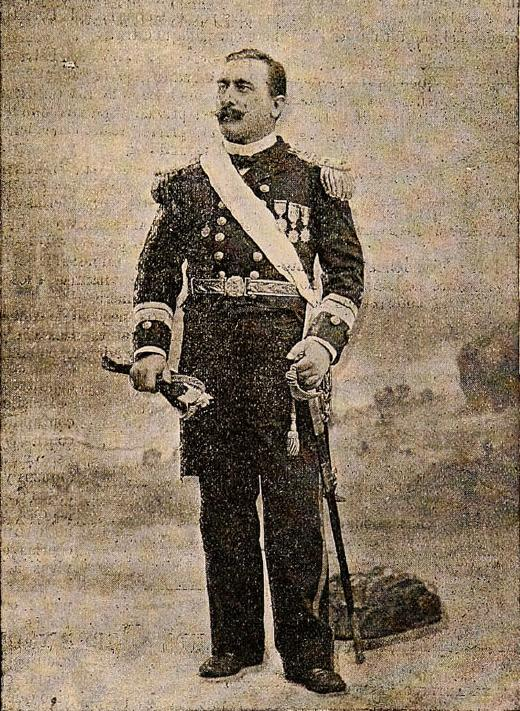 rturo Fernández Vial (Santiago, 15 de marzo de 1858-Santiago, noviembre de 1931) fue un marino chileno, que se desempeñaba como guardiamarina de la corbeta Esmeralda cuando ocurrió el Combate naval de Iquique, el 21 de mayo de 1879. Participó en la Guerra del Pacífico y en la Guerra Civil de 1891.